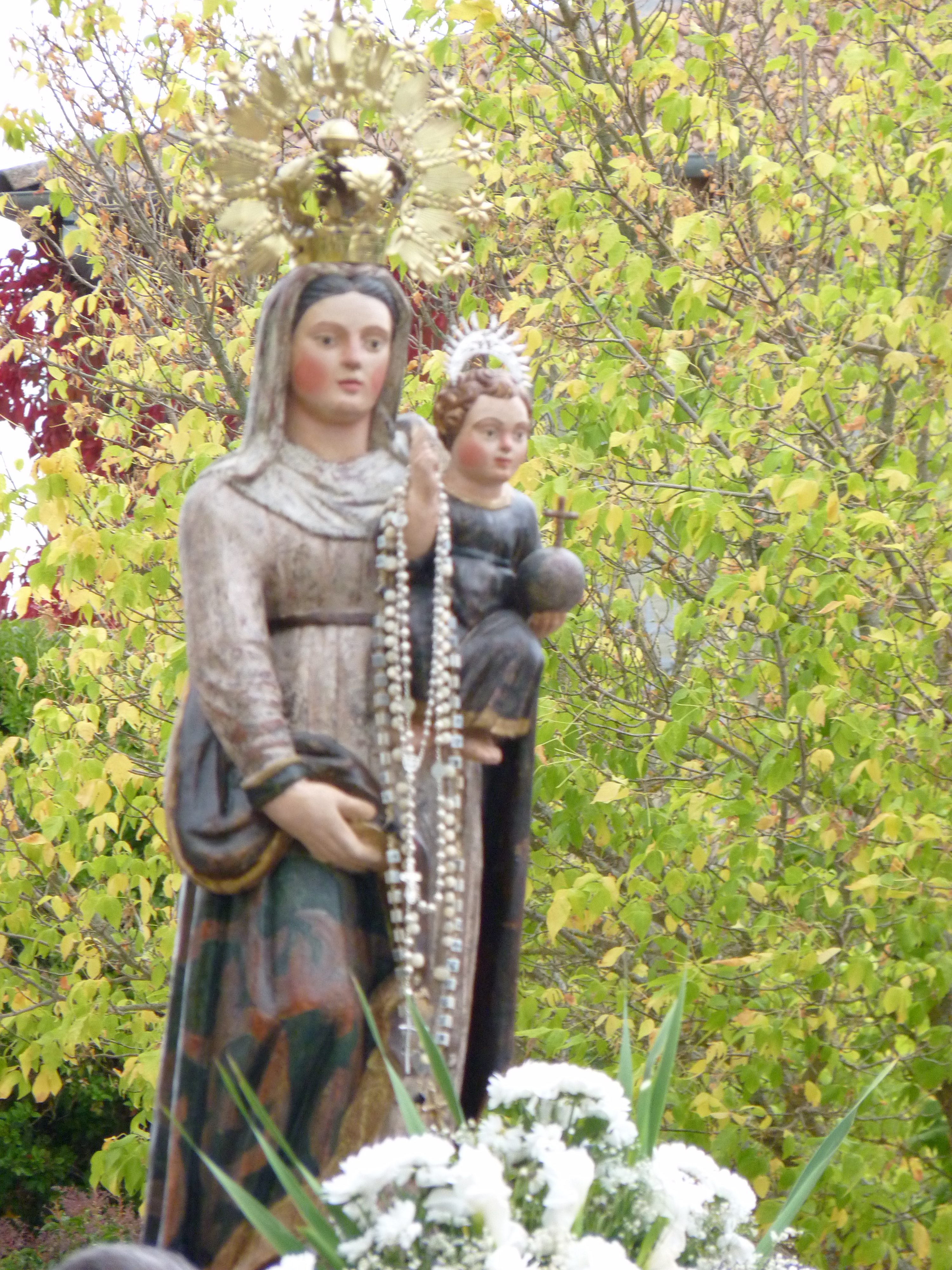 Virgen del Rosario. Navamorales (Salamanca, España). Segunda mitad s. XVI. Autor desconocido.